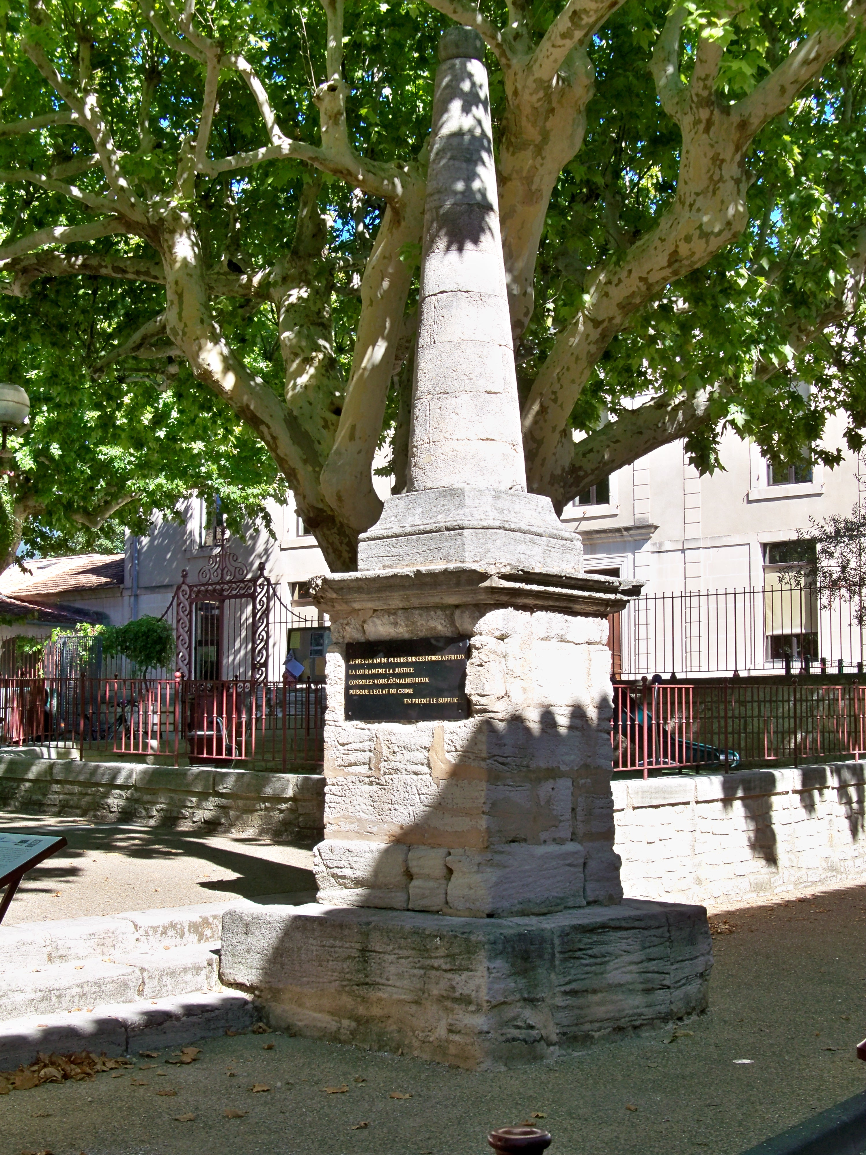 Monument commémoratif aux victimes de la Révolution, dit aussi la pyramide, à Bédoin (Vaucluse, France).